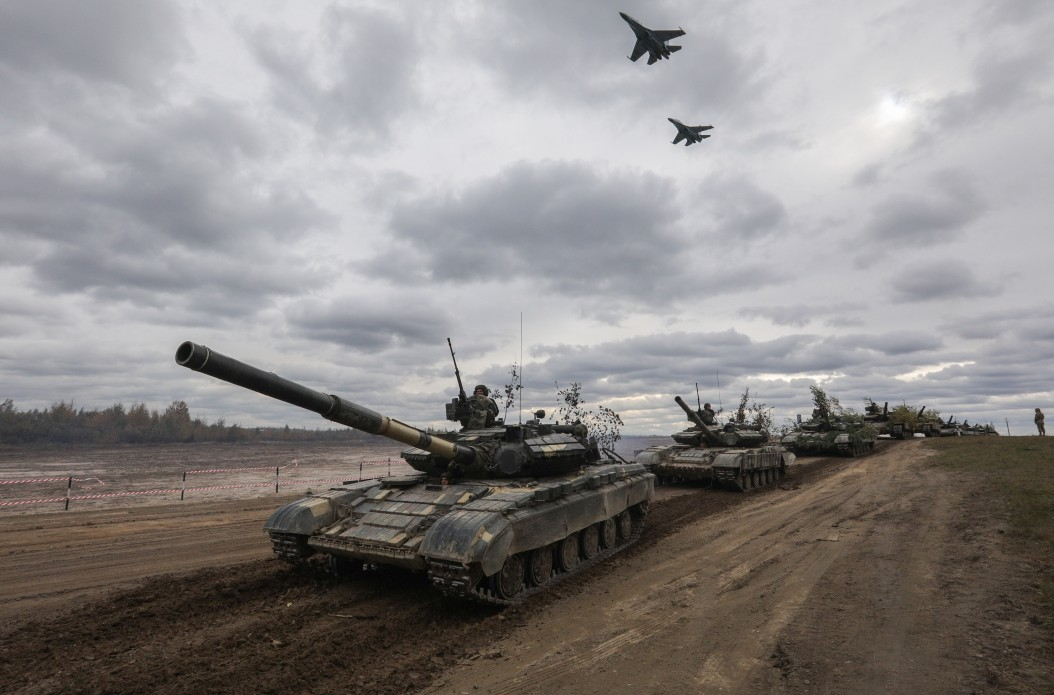 Т-64БВ.